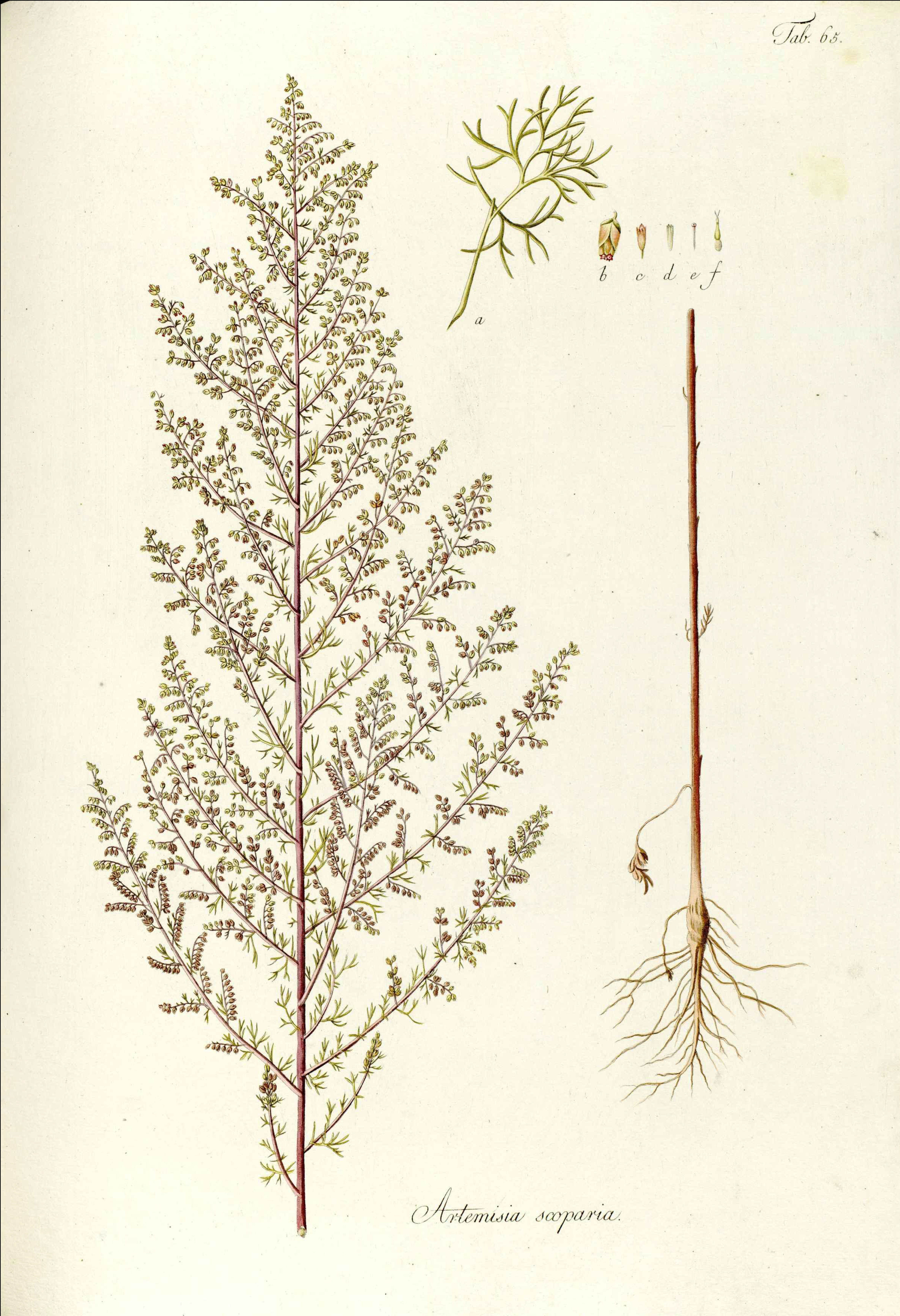 Waldstein-Wartenbur, F. & Kitaibel, P. (1799-1802) Descriptiones et icones plantarum rariorum Hungariae. 1. Band. Matthias Andrea Schmidt, Wien. Tafel 65. Legende: Oberer Teil der Pflanze. Unterer Teil der Pflanze. a Grundblatt. b Körbchen (vergr.). c Innere zwittrige Röhrenblüte (vergr.). d Staubblattröhre, innere Röhrenblüte (vergr.). e Griffel, nnere Röhrenblüte (vergr.). f Äußere weibliche Röhrenblüte (vergr.).